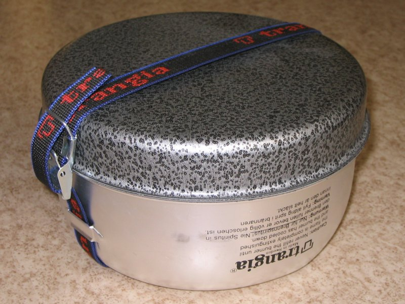 Trangia series 27-4 outdoor stove. Trangia sarjan 27-4 retkikeitin pakattuna. Own work. Oma kuva.